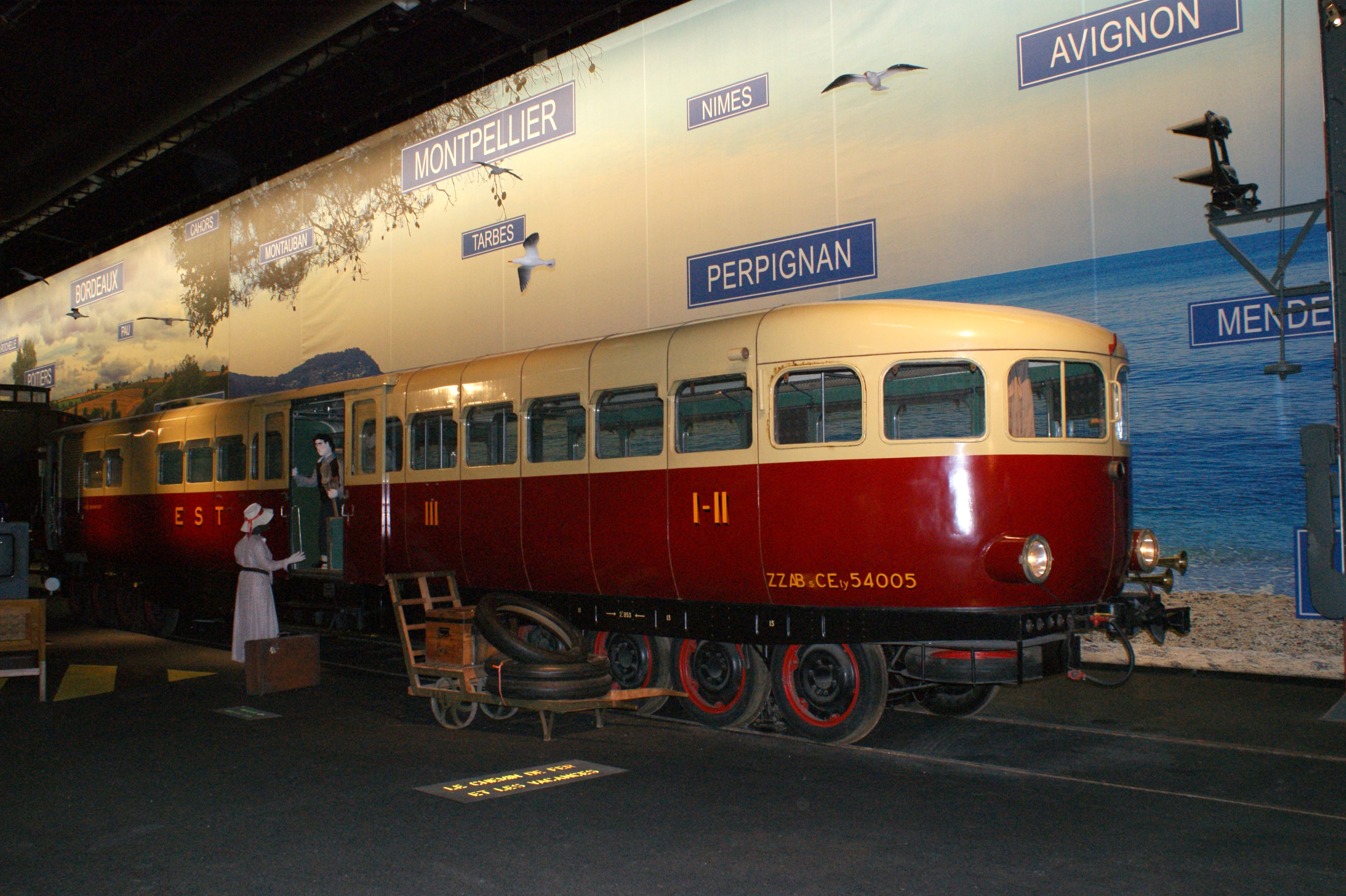 Est Schneider diesel baggage car No.ZZAB5C Ety 54005 (SNCF No.XM 5005) built 1936. At the SNCF Museum, Mulhouse, 3/09.